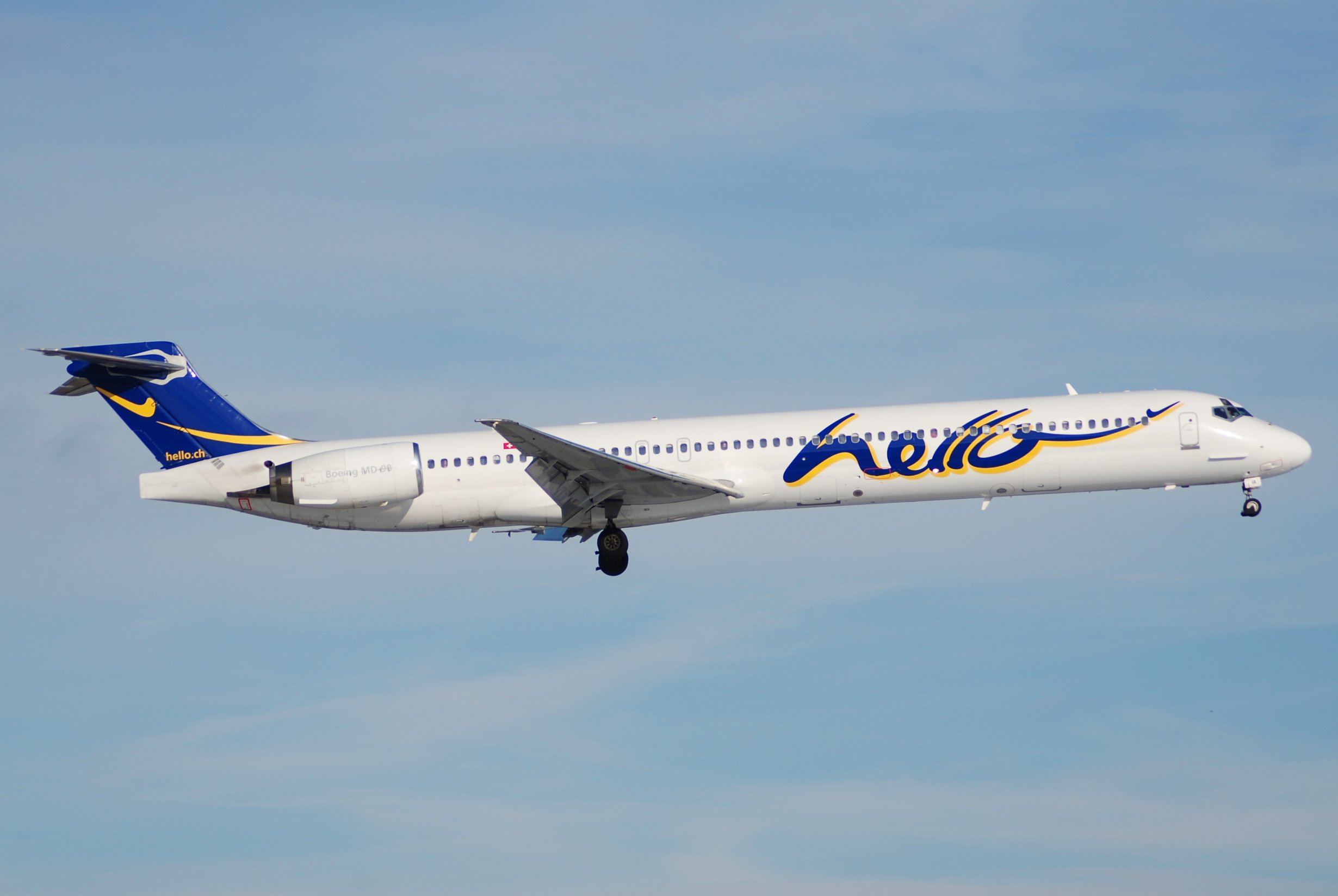 Hello MD-90; HB-JIA@ZRH;27.01.2007/449fs